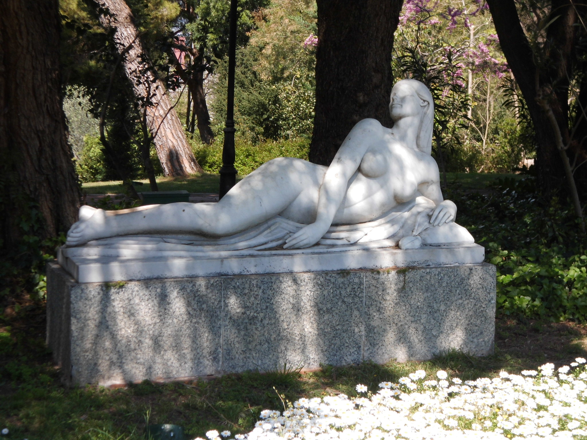 Dona ajaguda (Enric Monjo). Jardins Joan Maragall (Barcelona)